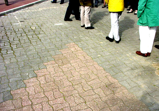 Dispositif de démonstration de l'association ADOPTA ; association Loi 1901 réunissant la ville de Douai, le Conseil régional du Nord Pas-de-Calais et l'Agence de l'eau Artois picardie, dédiée à l'expérimentation et à la prompotion de techniques alternatives de lutte contre les inondations et le ruissellement urbain. Ces pavés autoblocants laisse l'eau percoler dans une structures sous-jacente poreuses qui fait office de réservoir et zone-tampon.